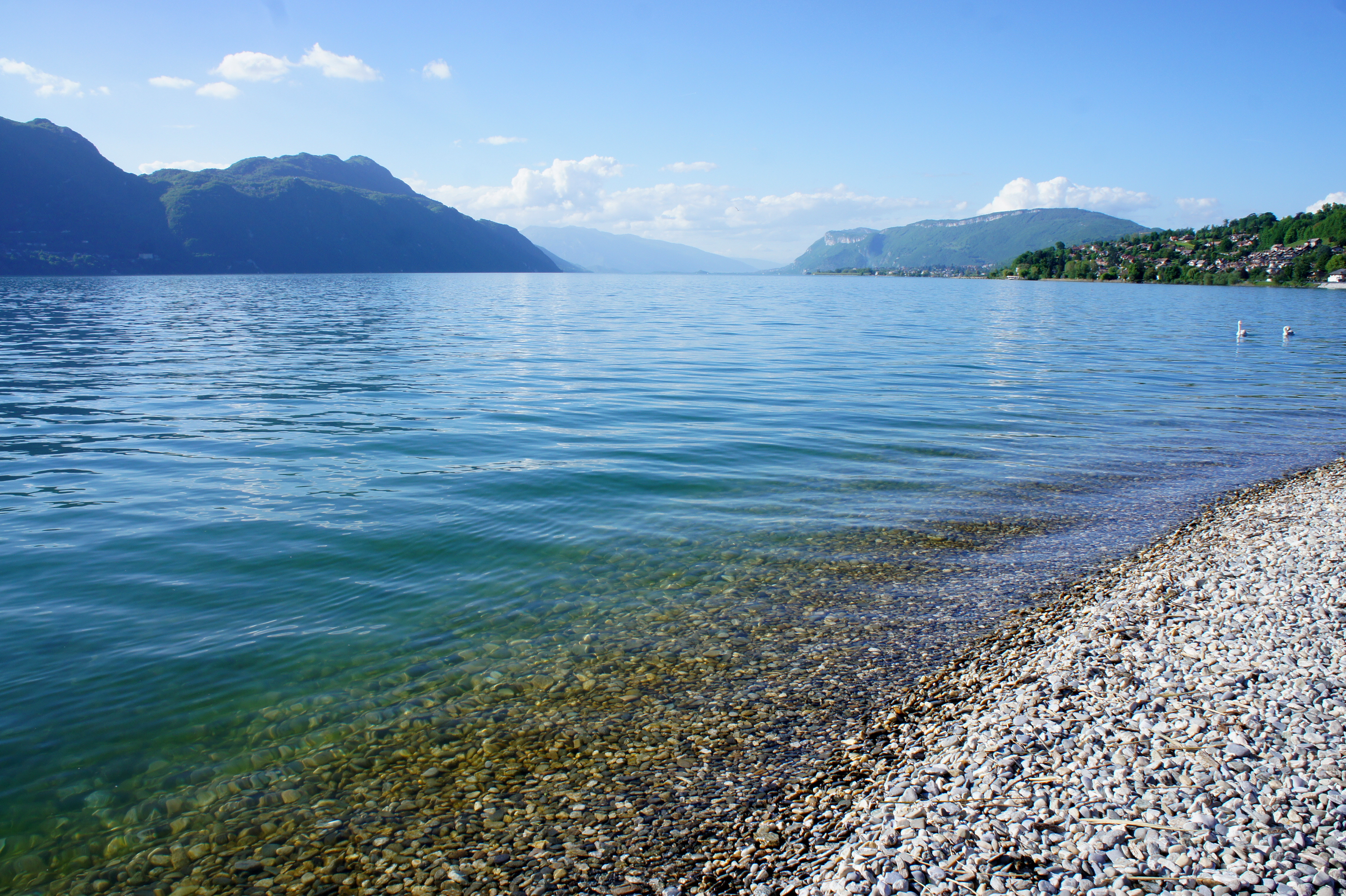 à gauche, le Colm du Chat ; à dr. la Chambotte